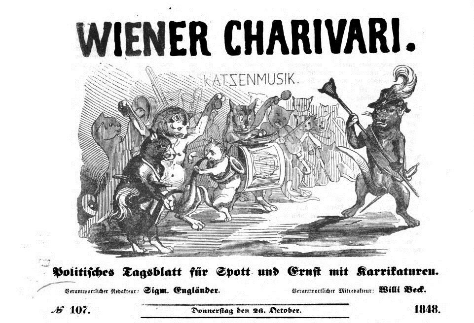 Wiener Katzen-Musik 26. Oktober 1848, Ausgabe 107 (Ausschnitt von File:Wiener Katzen-Musik 1848 107-1.jpg)